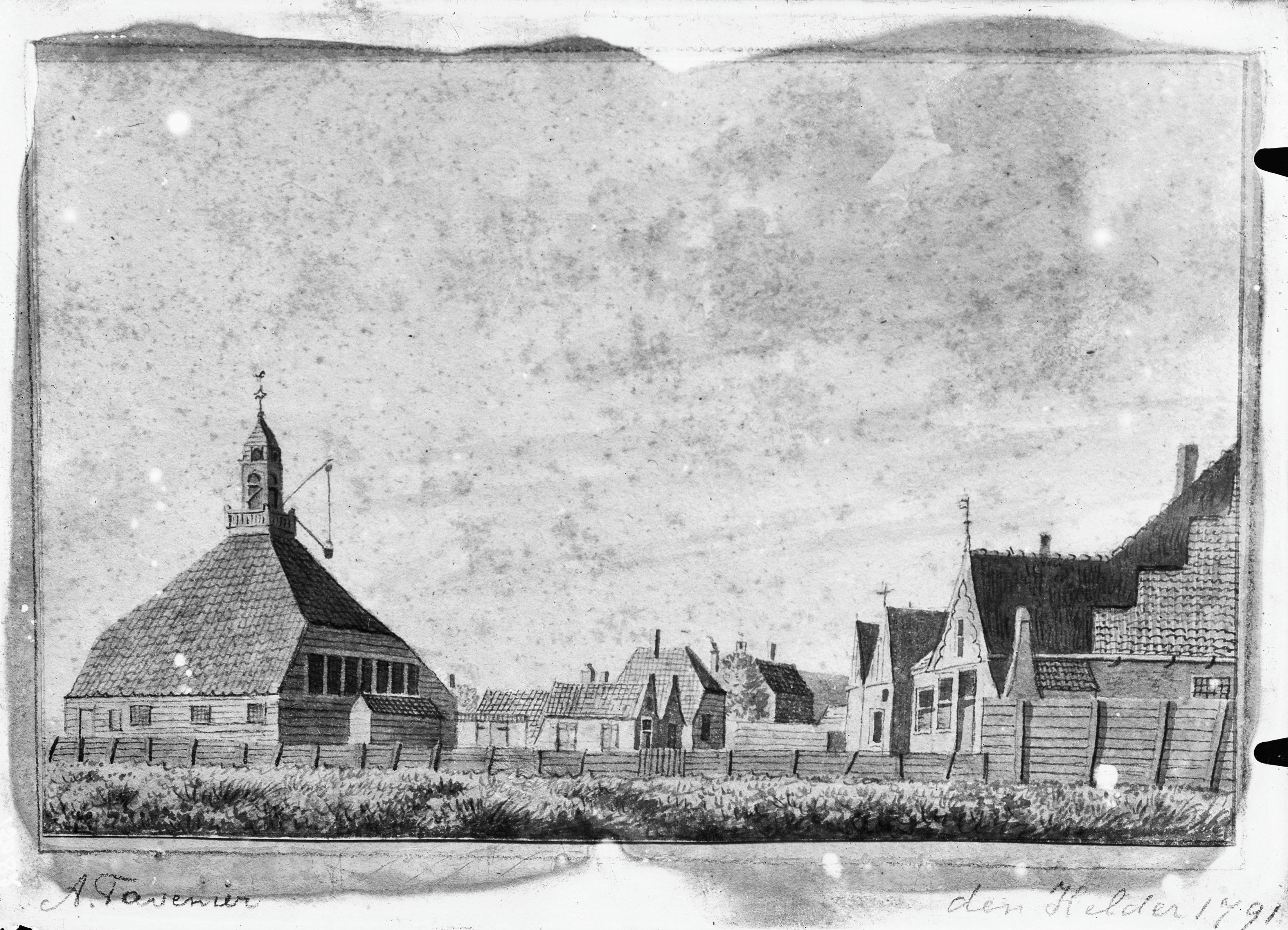 Verdwenen kerkje: naar tekening van H.Tavenier